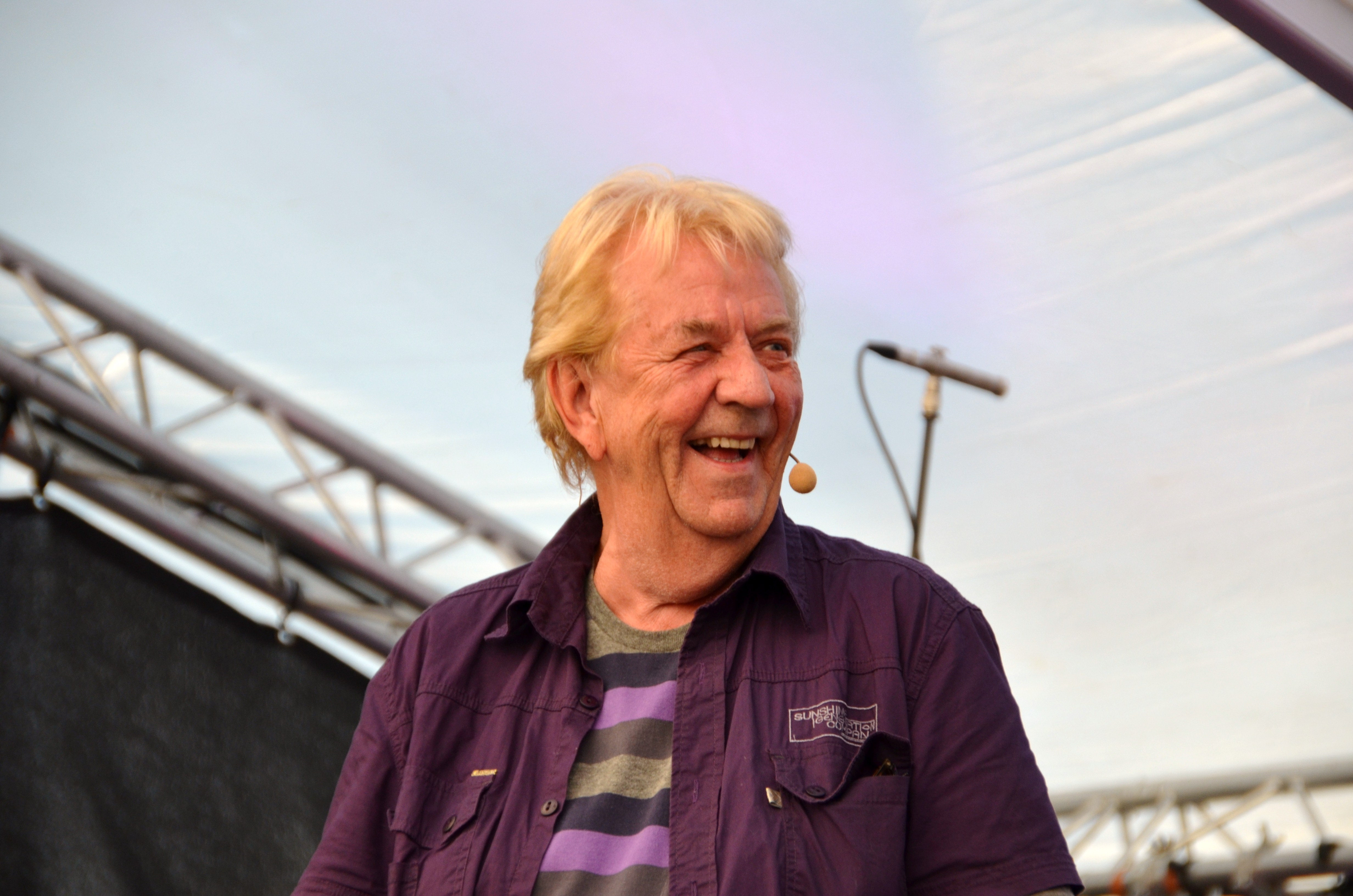 Tor Erik Gunstrøm ved Langesund revyfestival 19.-21. august 2011.